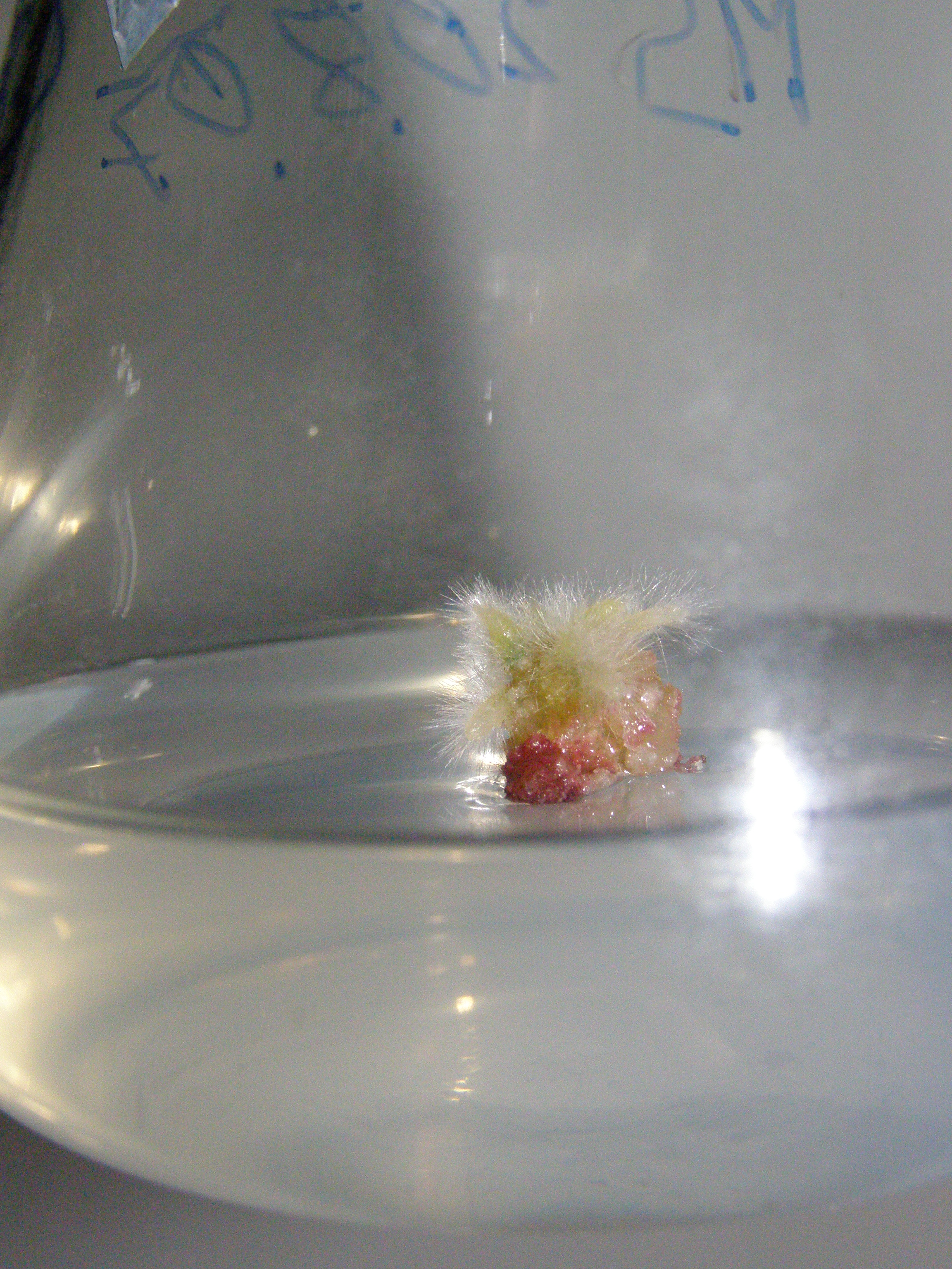 Tvorba gločid na tkáni Mammillaria sp. ve zkumavce na MS mediu. Praha, Česká republika.